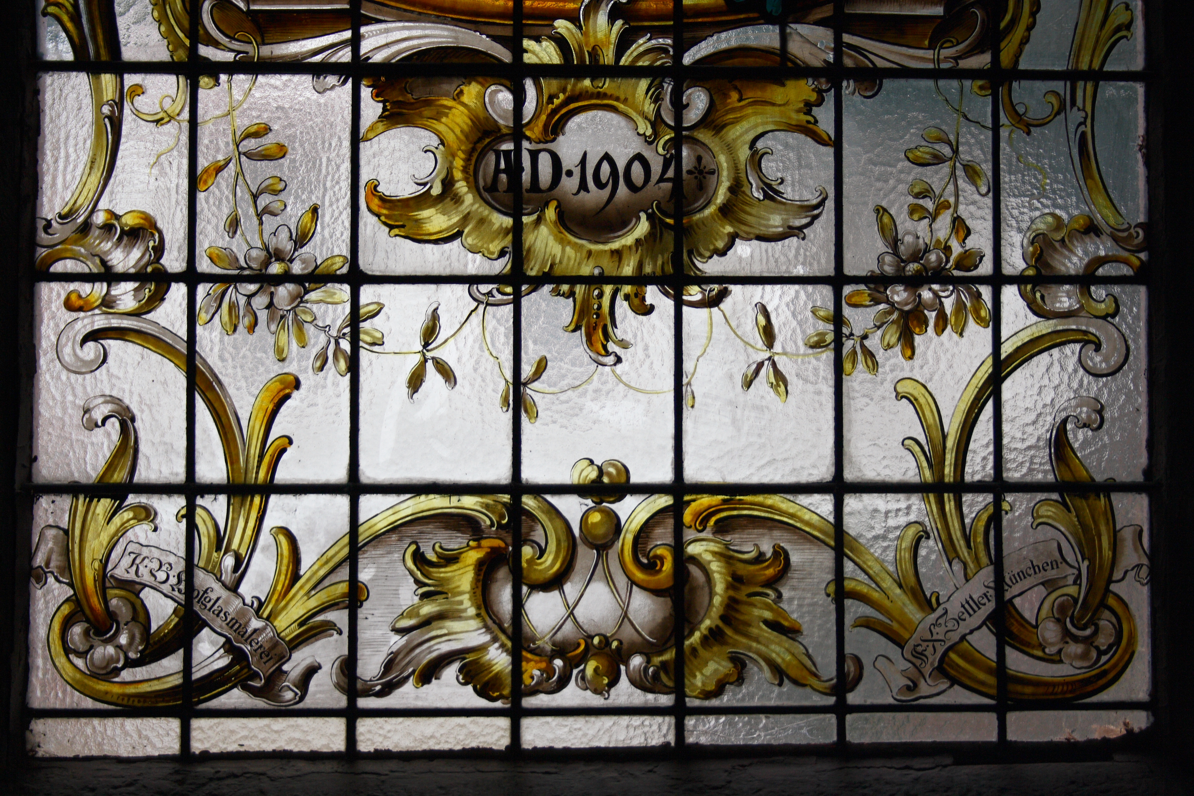 Bleiglasfenster in der katholischen Pfarrkirche St. Michael in Lohr am Main im Landkreis Main-Spessart (Bayern) Ausschnitt mit Sigbatur: K.B. Hofglasmalerei F.X.Zettler München, 1904